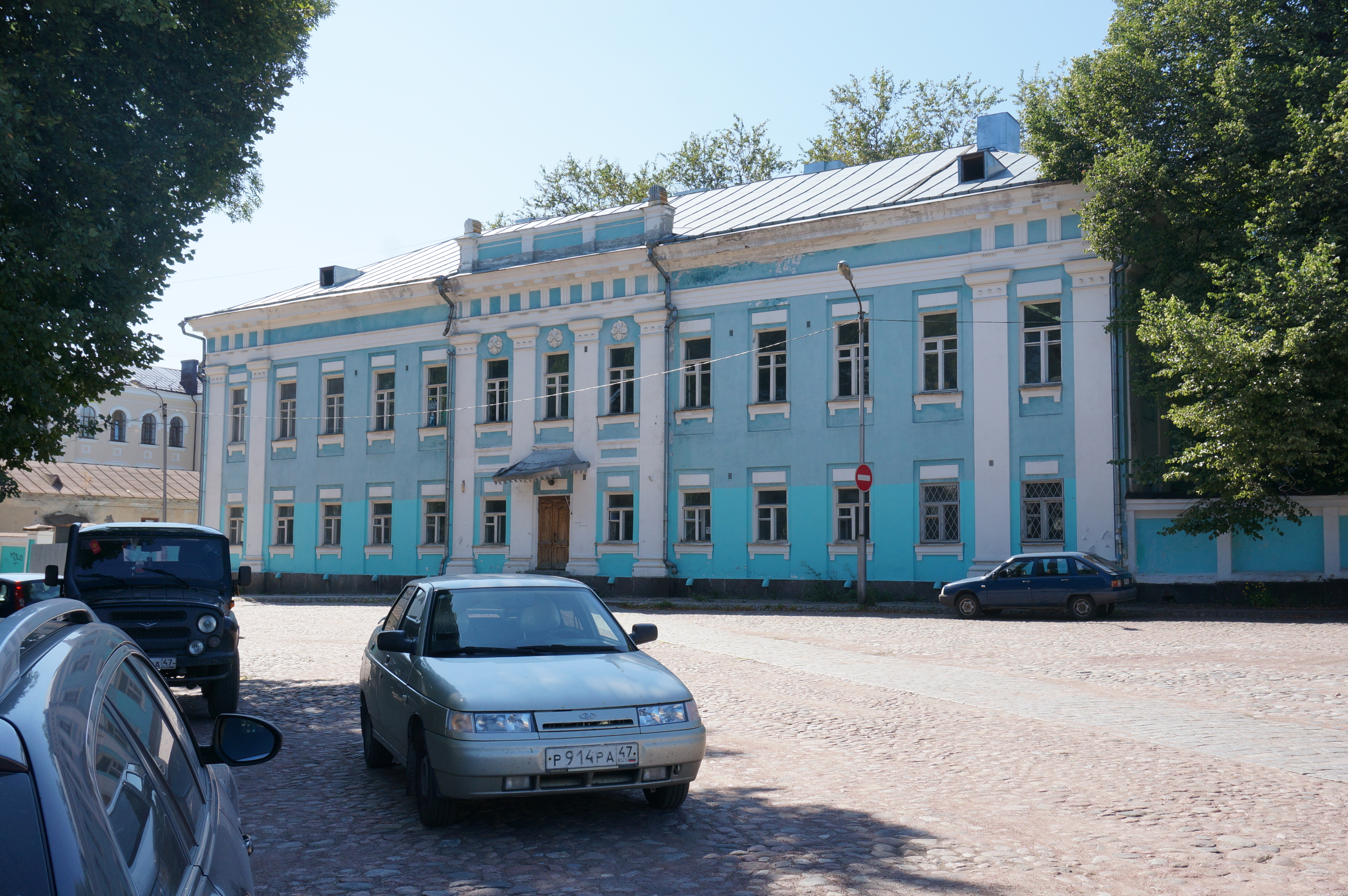 Дворец наместника (губернского суда) (Санкт-Петербург и Лен.область, Выборг, сторожевой башни улица, 27)